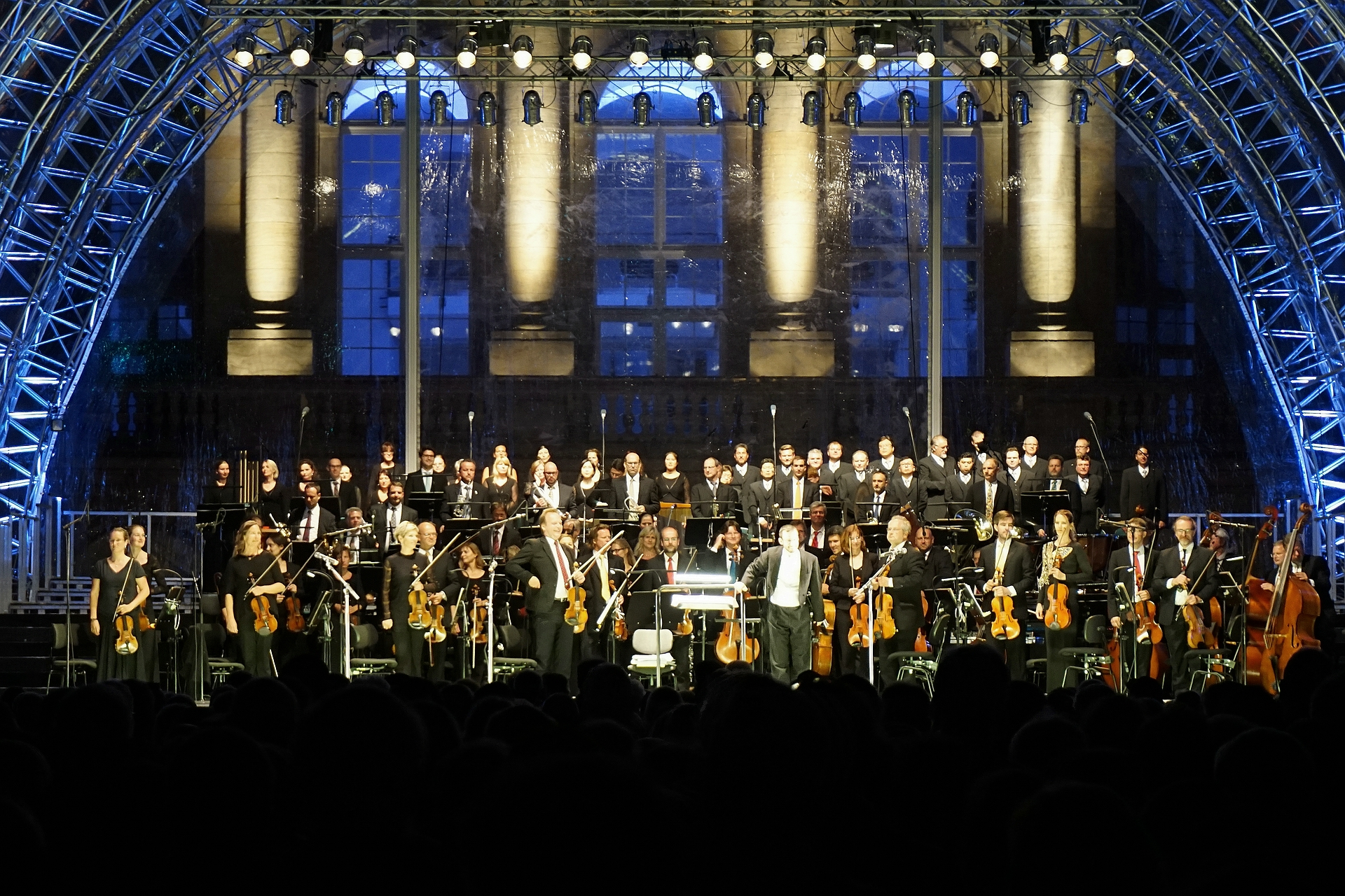 Die Robert-Schumann-Philharmonie Chemnitz zur Spielzeiteröffnung 2016 auf dem Theaterplatz vor dem Opernhaus